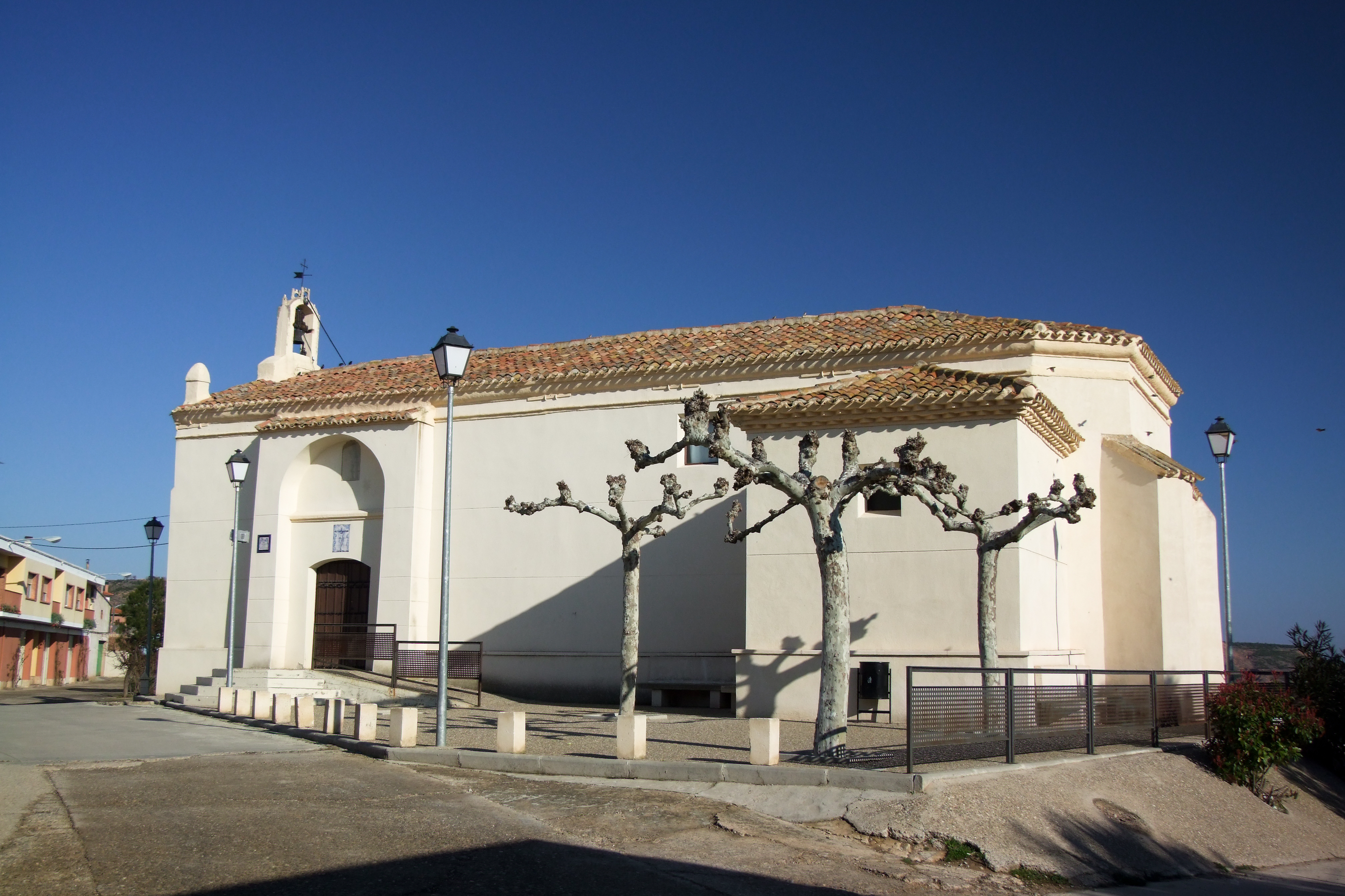 Ermita del Cristo de los Buenos Temporales en la localidad de El Villar de Arnedo, La Rioja - España